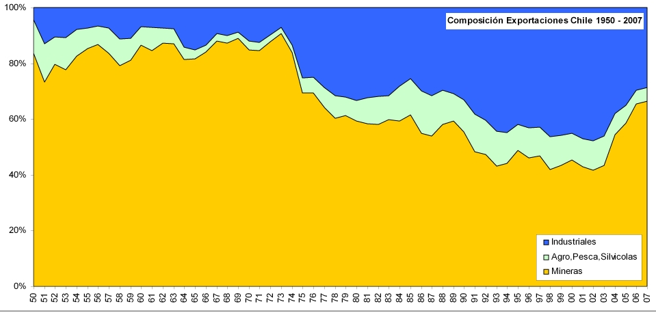 erfil Exportador de Chile